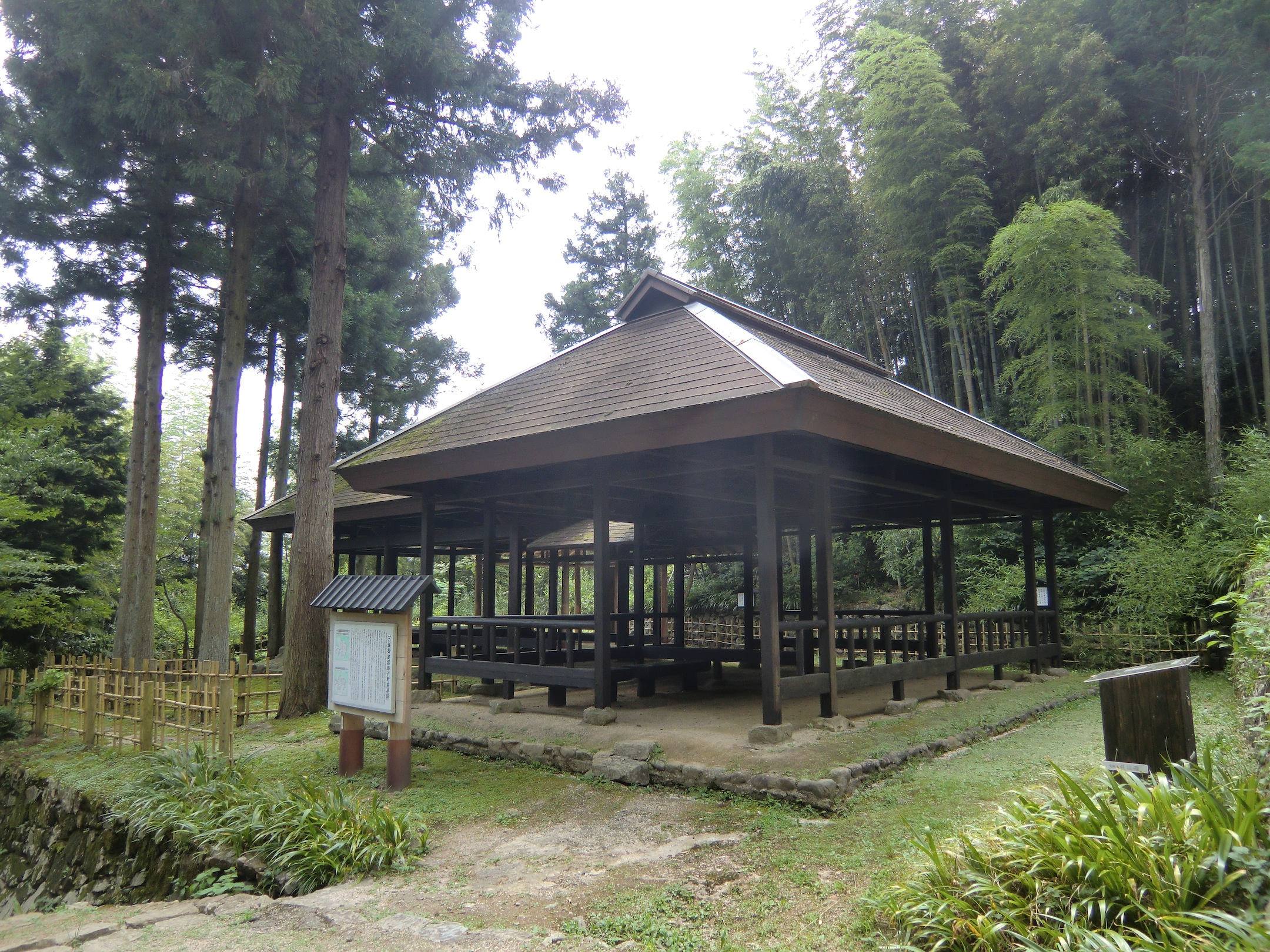 復元された六軒茶屋跡（山口県山口市）